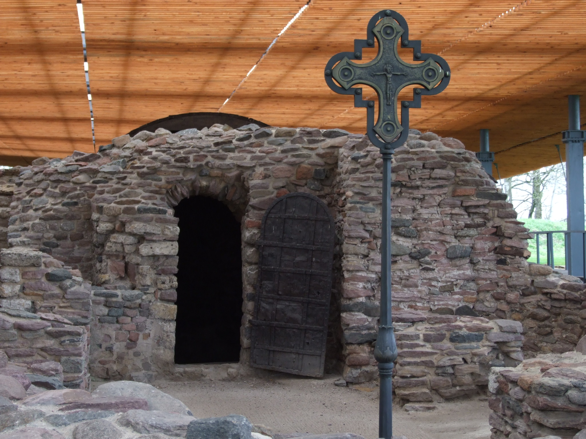 Ostrów Lednicki - ruiny palatium i kaplicy